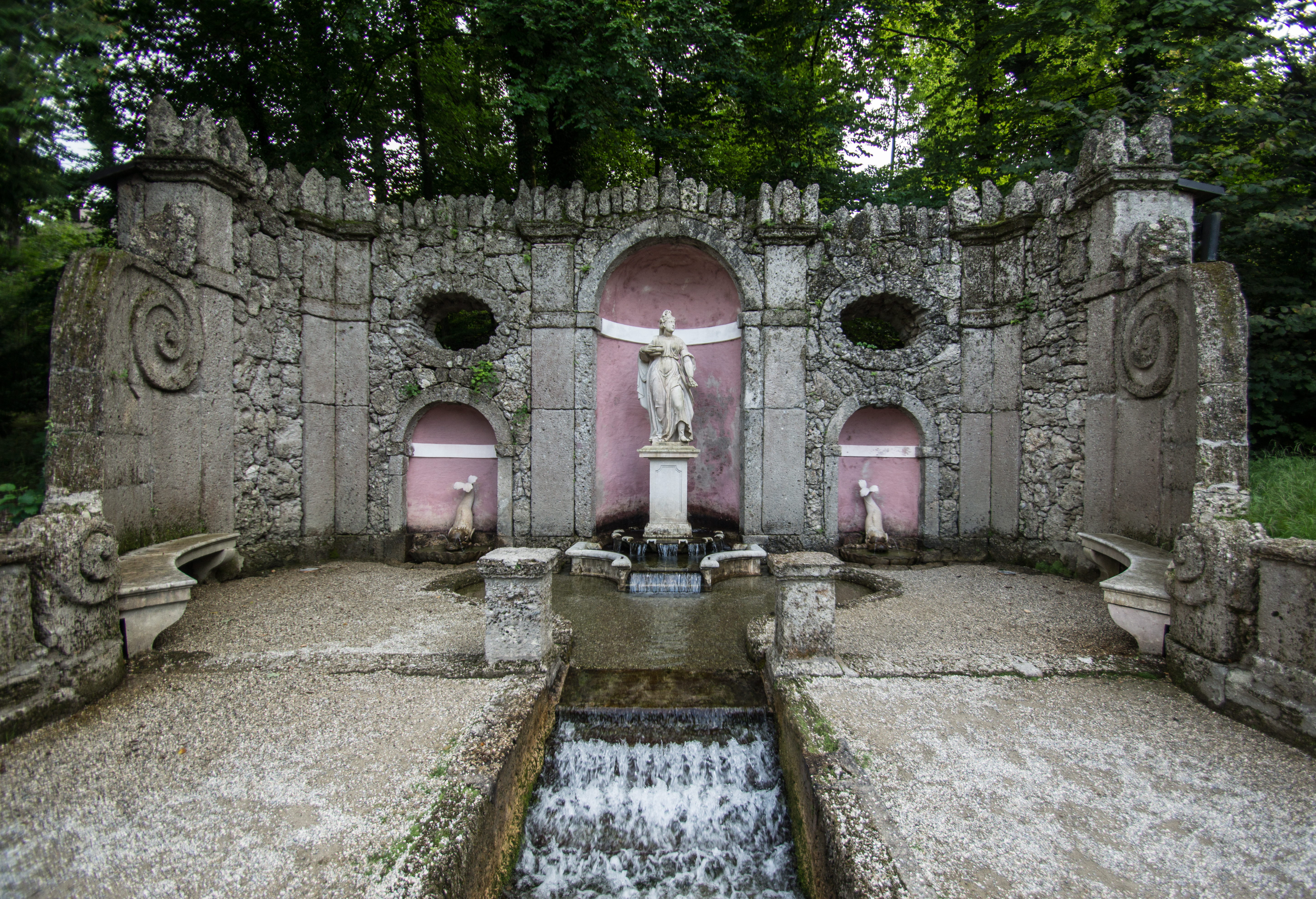 Schlossanlage Hellbrunn, Gesamtanlage samt Gartenbaudenkmalen